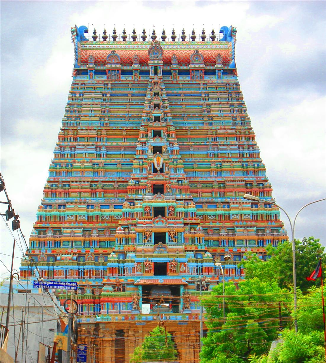 Photo view of Srirangam Rajagopuram